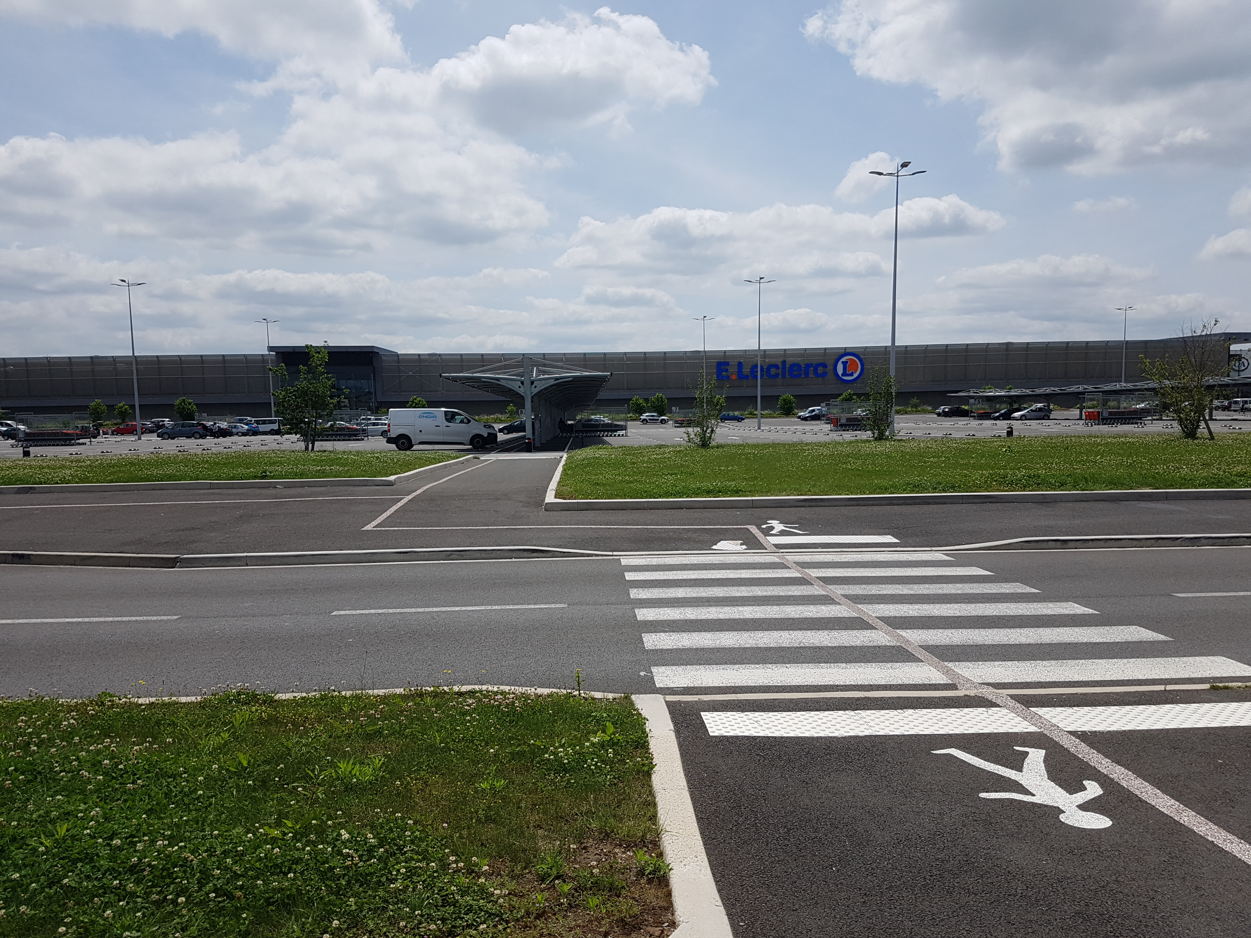 Centre E.Leclerc d'Avermes (nord de Moulins) de 2016